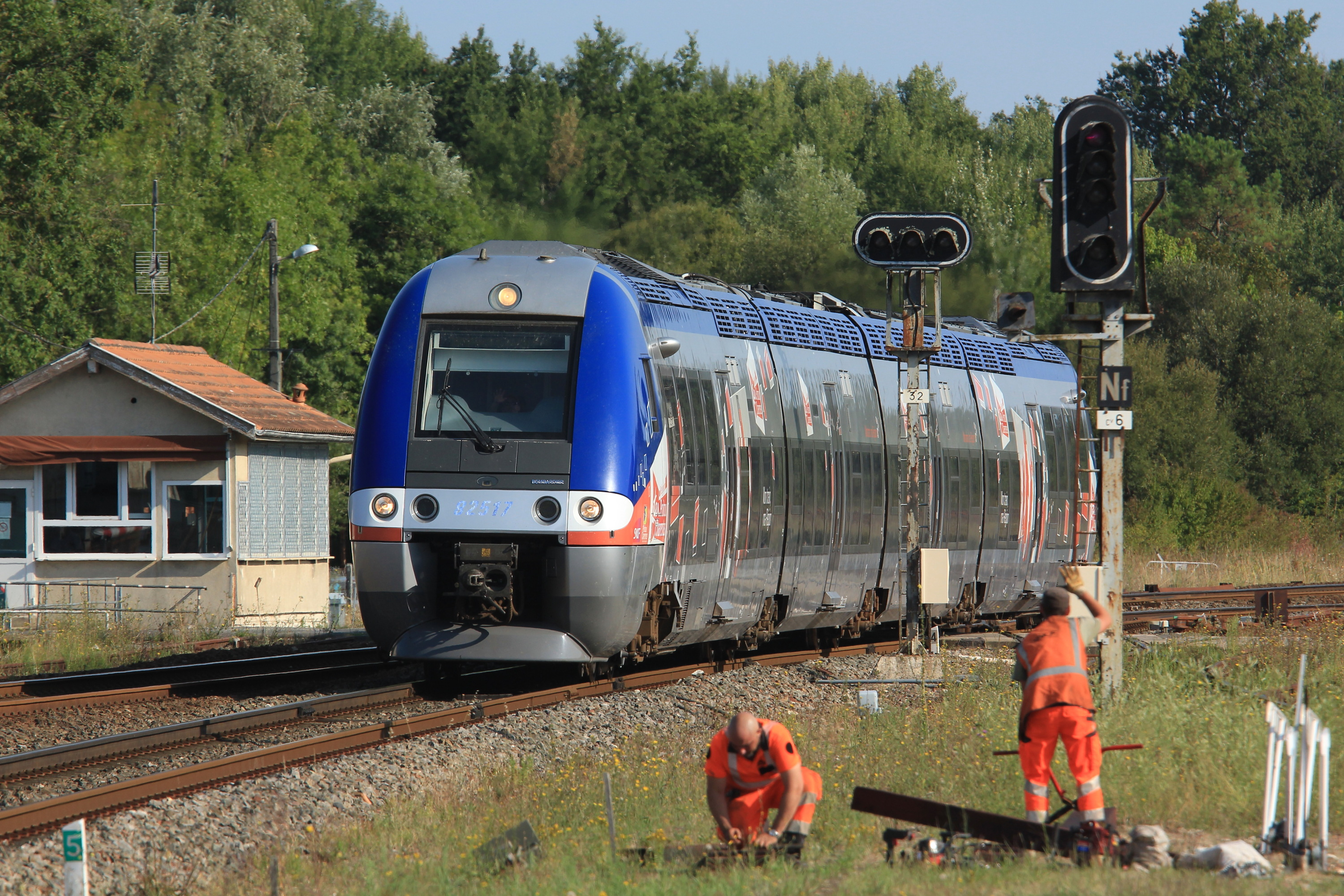 Le TER n° 864801 (La Rochelle-Ville - Bordeaux-St-Jean) assuré par le B 82517 en livrée Poitou-Charentes, arrive en gare de Saint-Mariens - Saint-Yzan. Il est pris en photo alors qu'il franchi le passage à niveau gardé n° 487, permettant à la route départementale n°250 de franchir les voies ferrées, à proximité immédiate de la gare. Au premier plan, des agents de la voie font une opération de maintenance sur les voies de services de la gare. Ces agents saluent le conducteur du train et réciproquement.